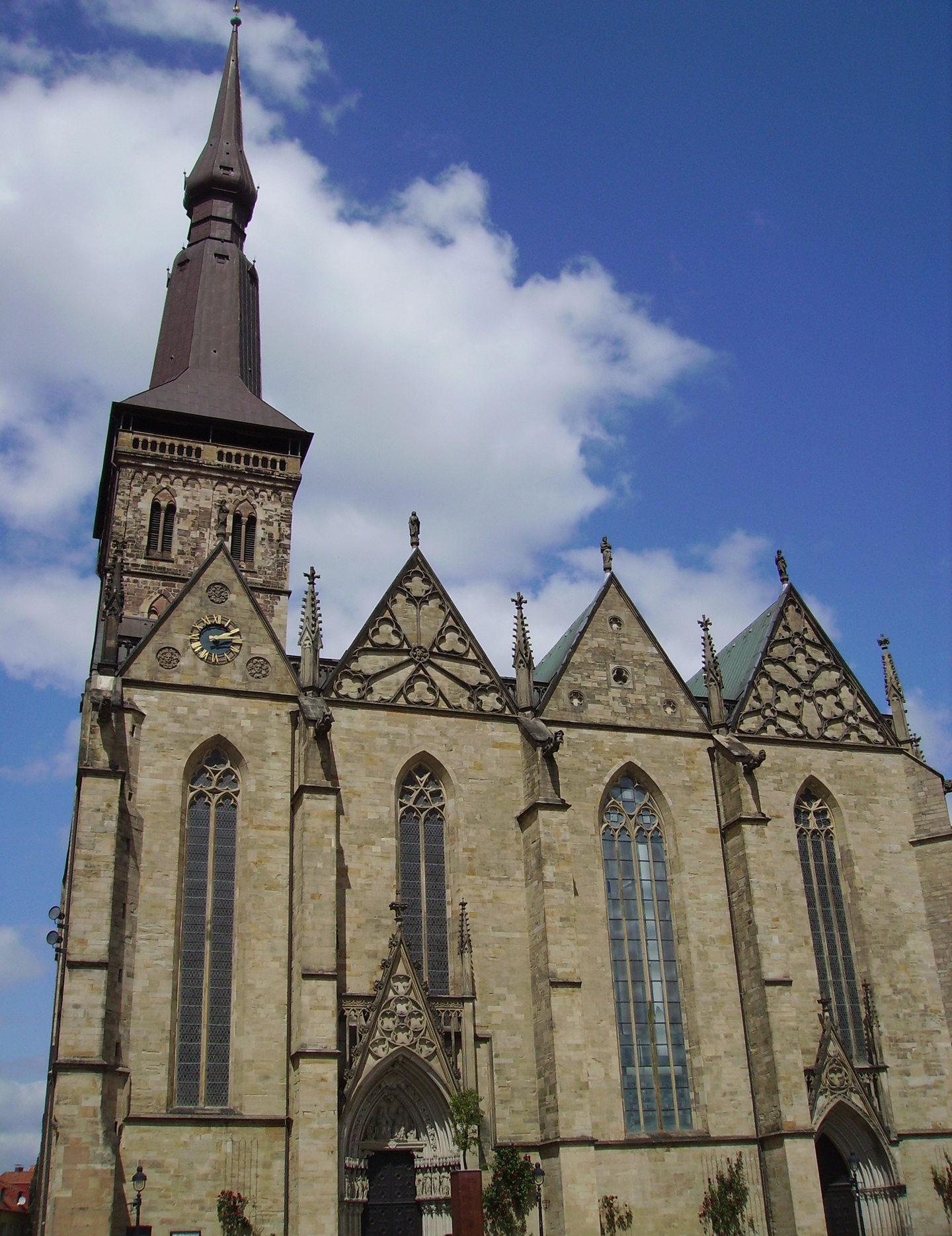 Die Kirche St. Marien in Osnabrück